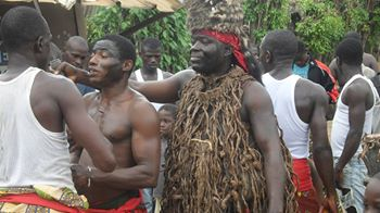 Danse guerrière à Ahoutoué: Septembre 2014